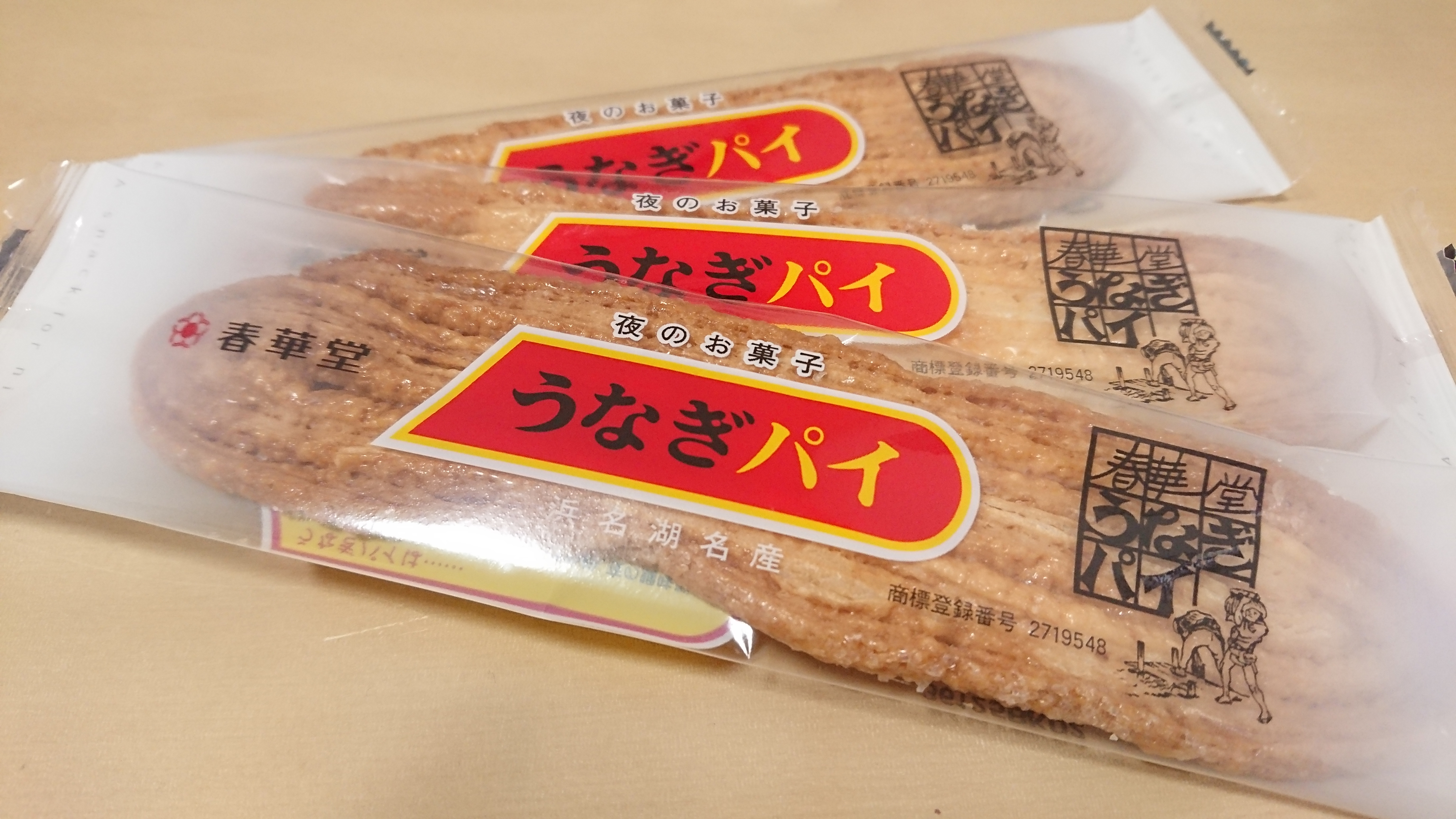 ein Gepäck Unagi-Pai auf japanisch